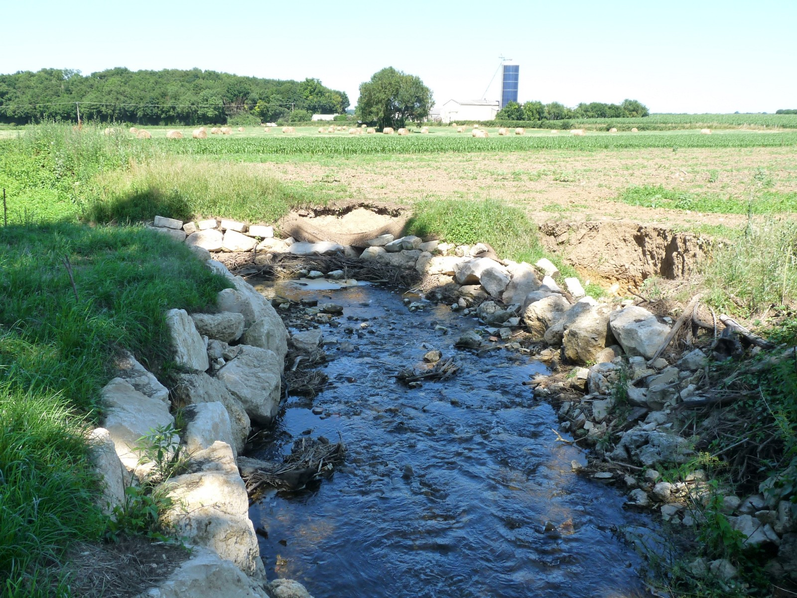 Dernier gouffre du Bandiat, en aval des Vieilles Vaures (les Pinonnes), Agris-Rivières, Charente, France